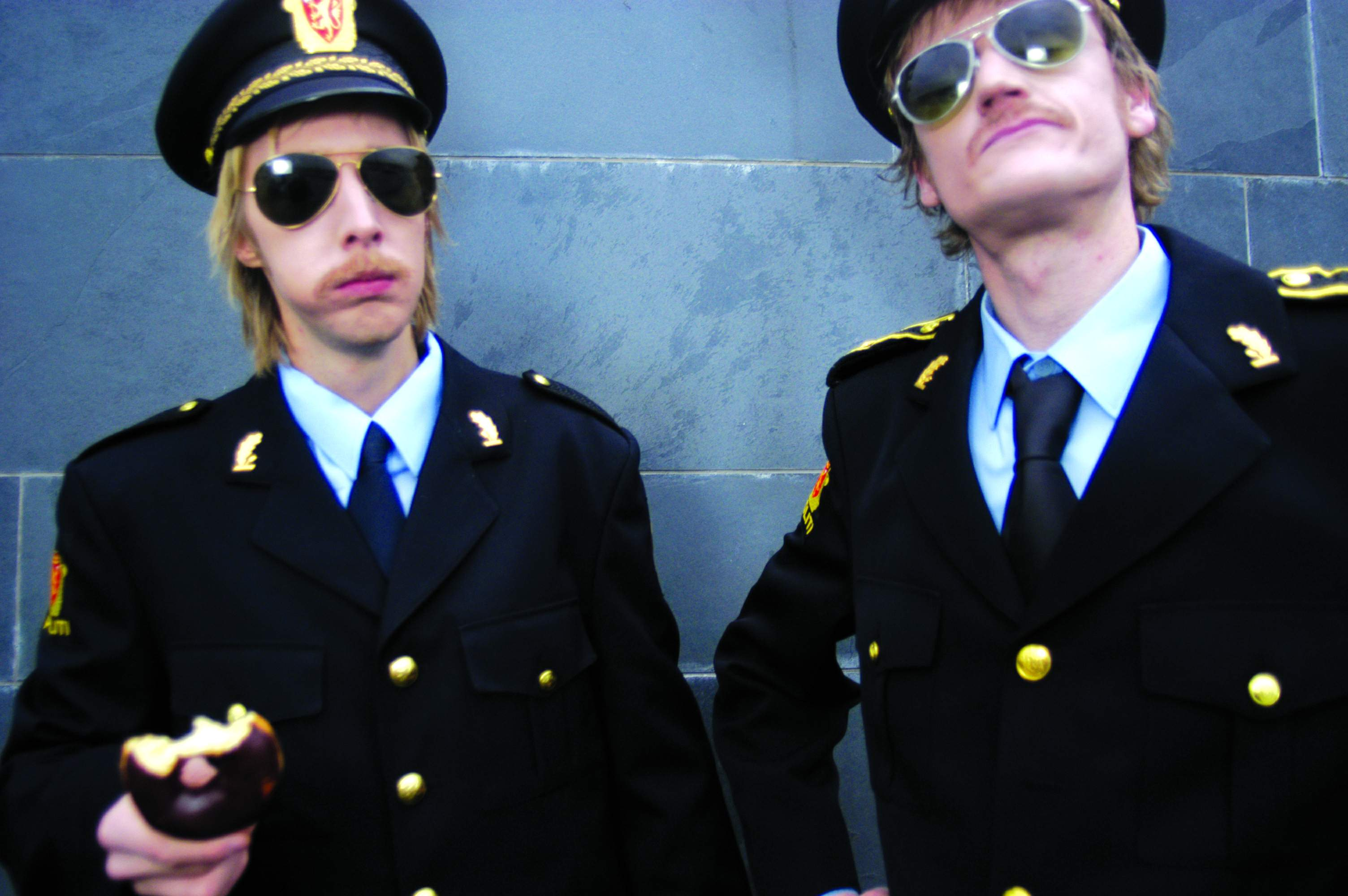 Klaus Skrudland og Trond Anfinnsen fra Elektrofant